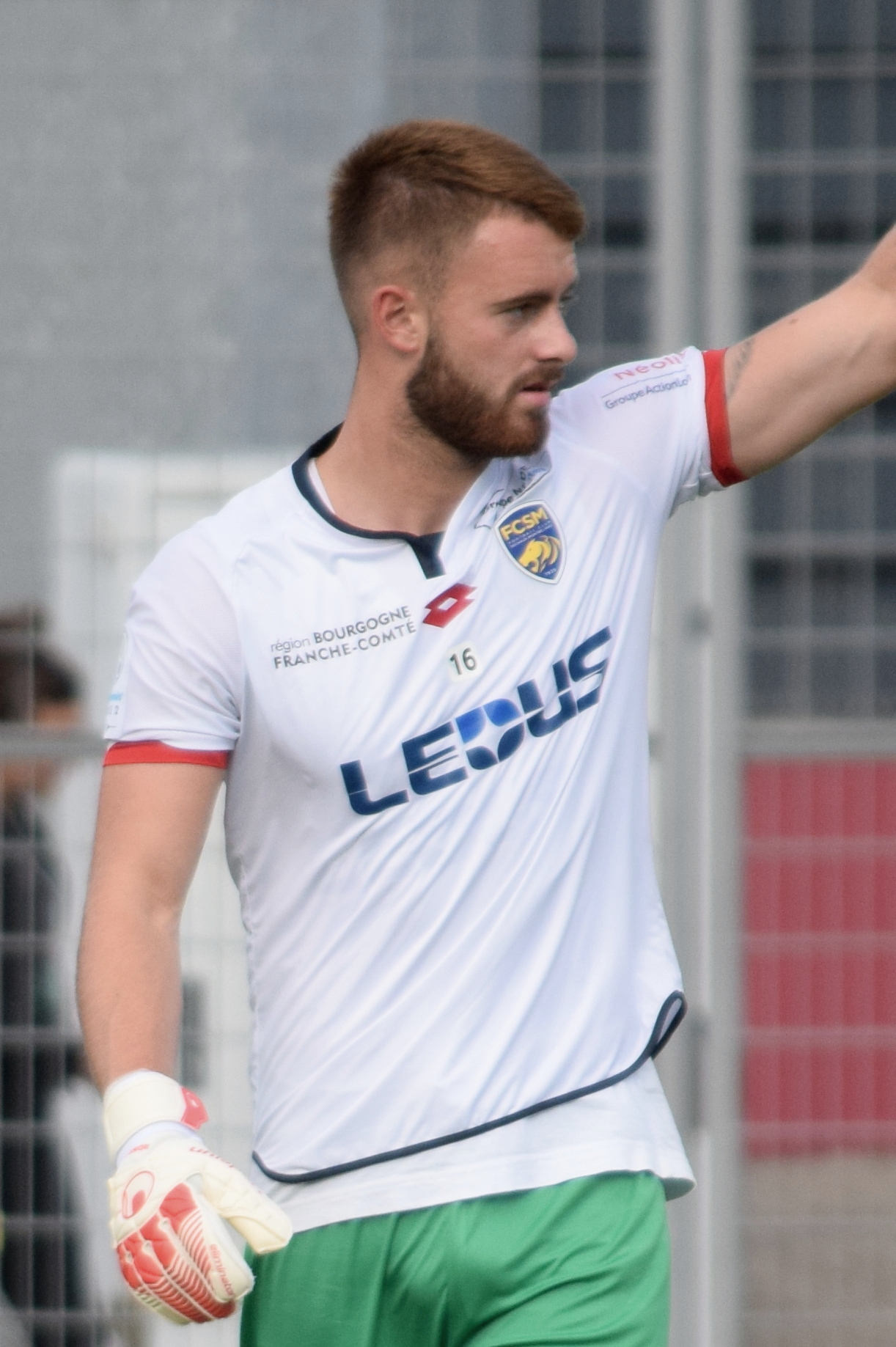 FCSM * DFCO